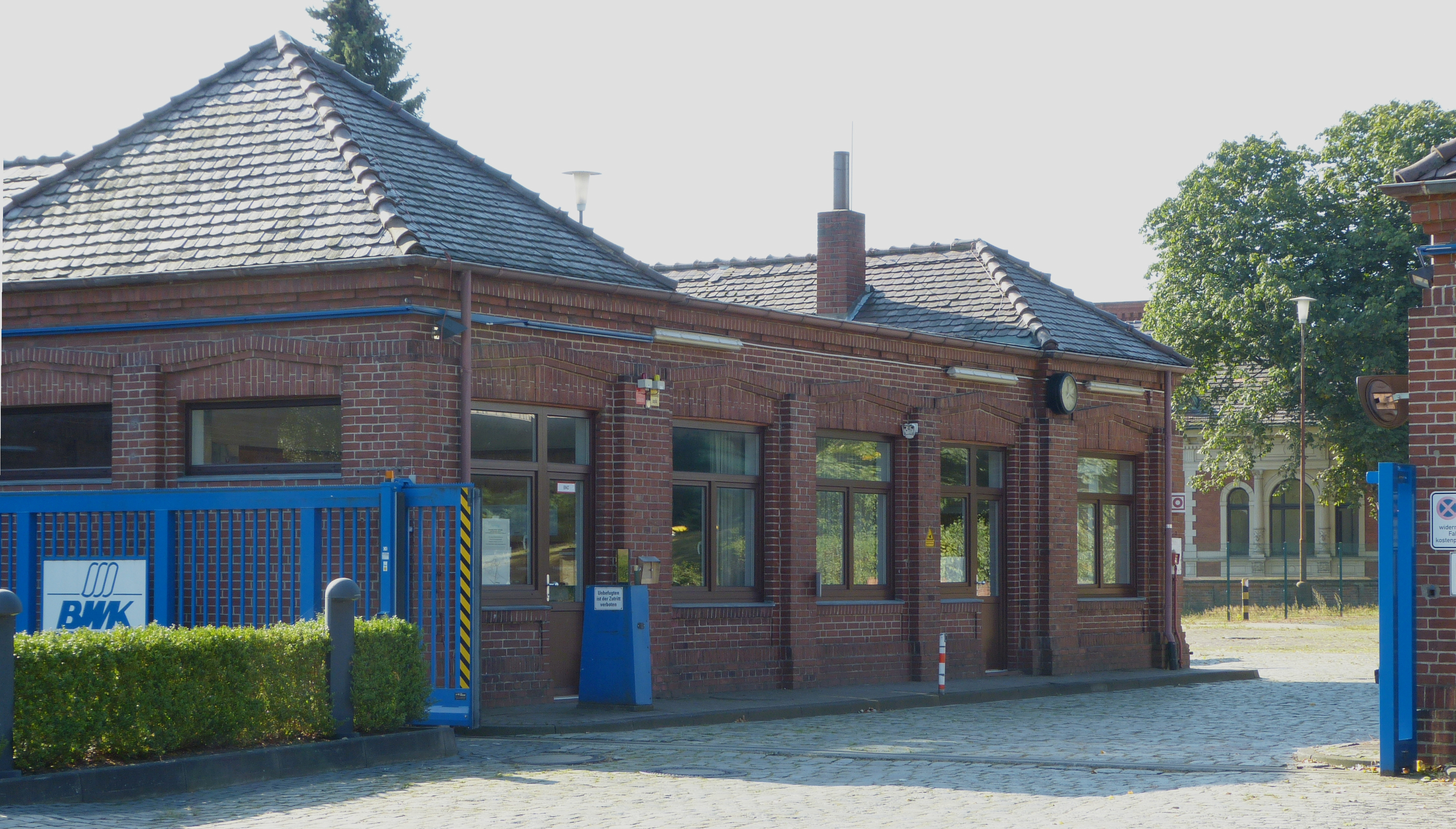 Bremer Wollkämmerei, Haus 162/163, Pförtner und Feuerwache in Bremen, Landrat-Christians-Straße 95ADas abgebildete Objekt ist ein geschütztes Kulturdenkmal in der Freien Hansestadt Bremen, mit der Nr. 2002 beim Landesamt für Denkmalpflege registriert.